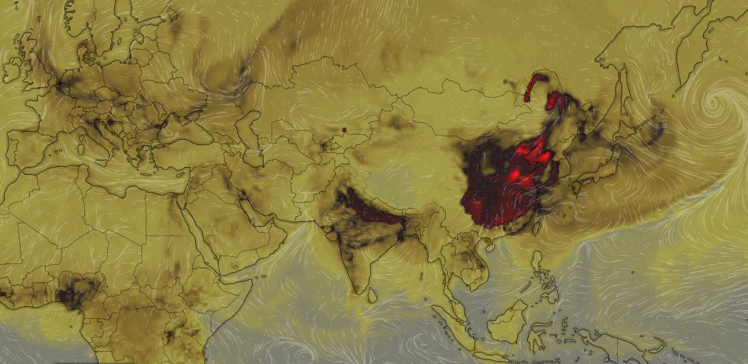 Một phần cảnh bị Cacbon monoxit của ngày 2 tháng 3 năm 2019. Vùng màu đỏ là vùng nguy hiểm bởi